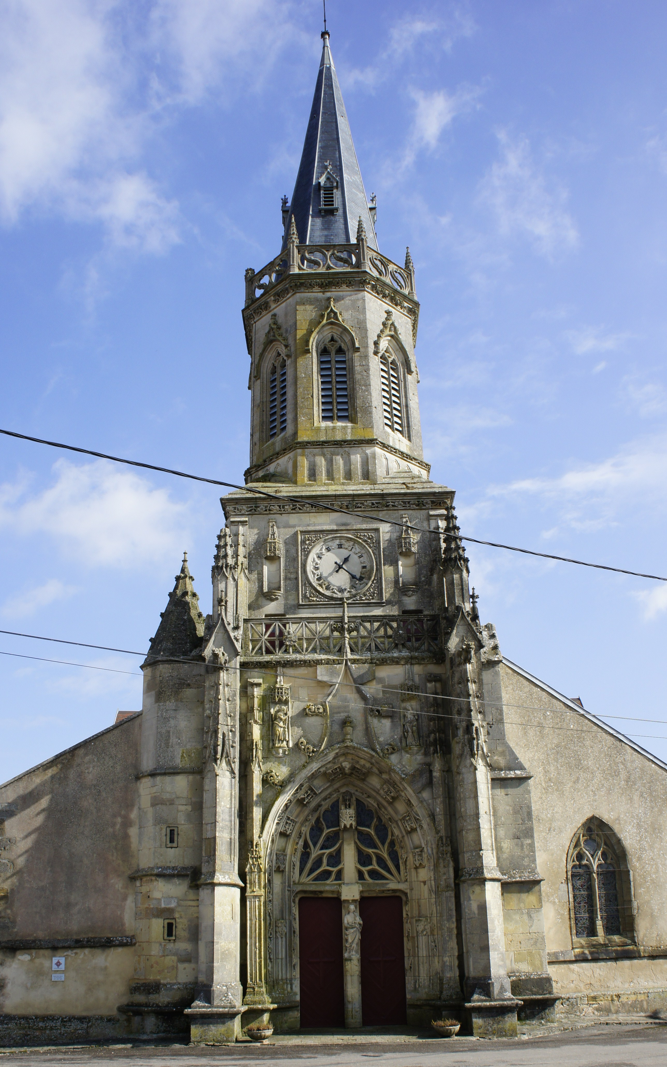 Une vue de l'Église_de_Beauzé_sur-Aire .